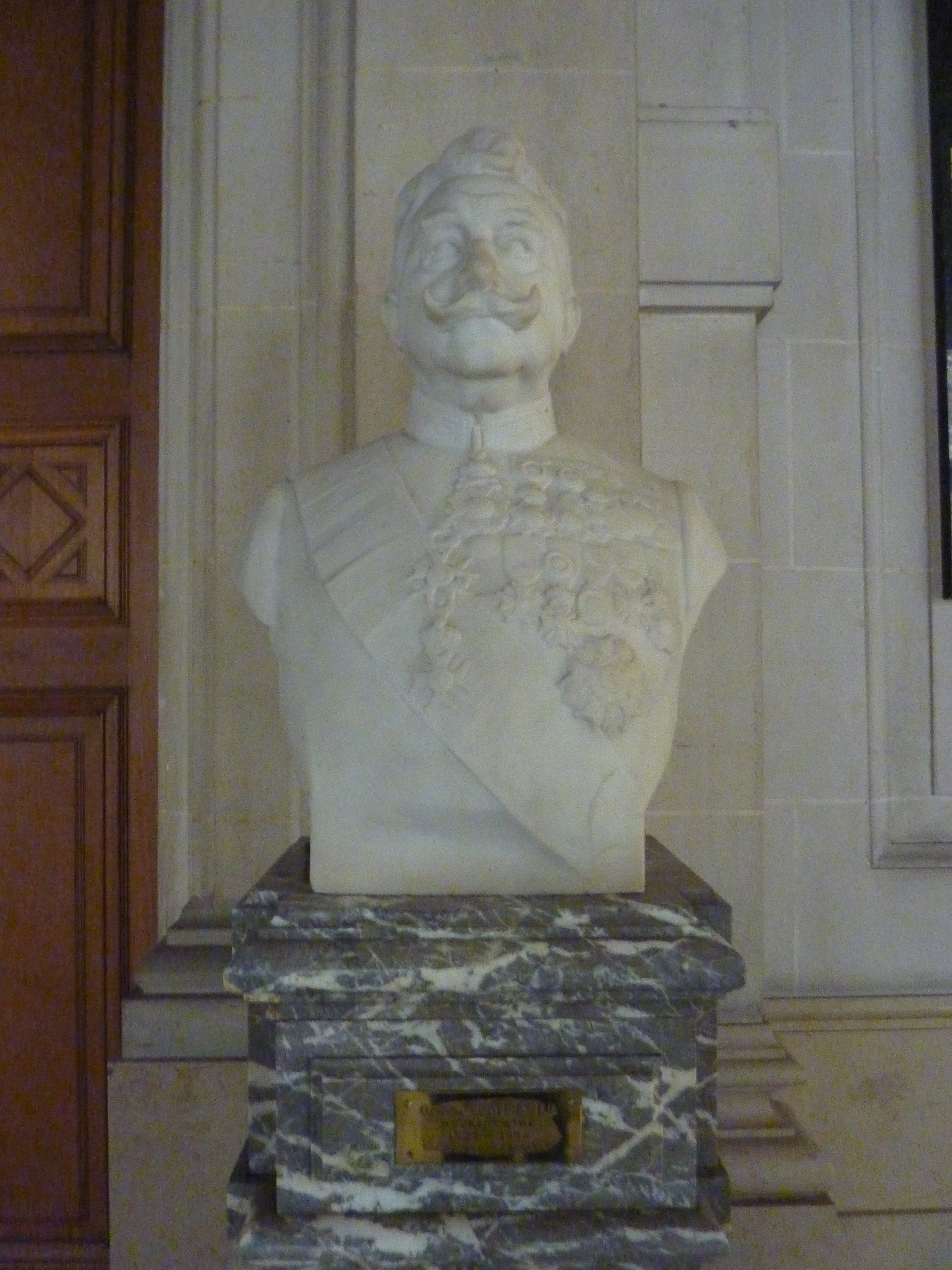 Général Jean-Baptiste Meiser.